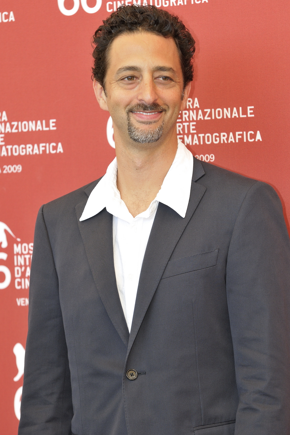 66ème Festival du Cinéma de Venise (Mostra), 6ème jour (07/09/2009) Photocall avec George Clooney et Elisabetta Canalis, Ewan McGregor et le réalisateur Grant Heslov pour le film : The men who stare at goats